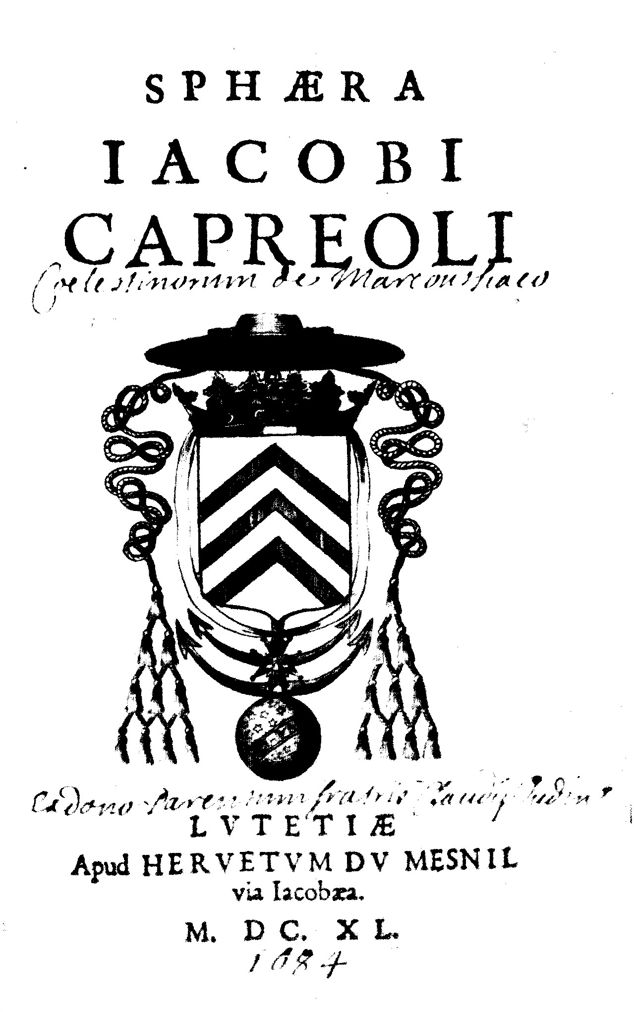 Frontespizio